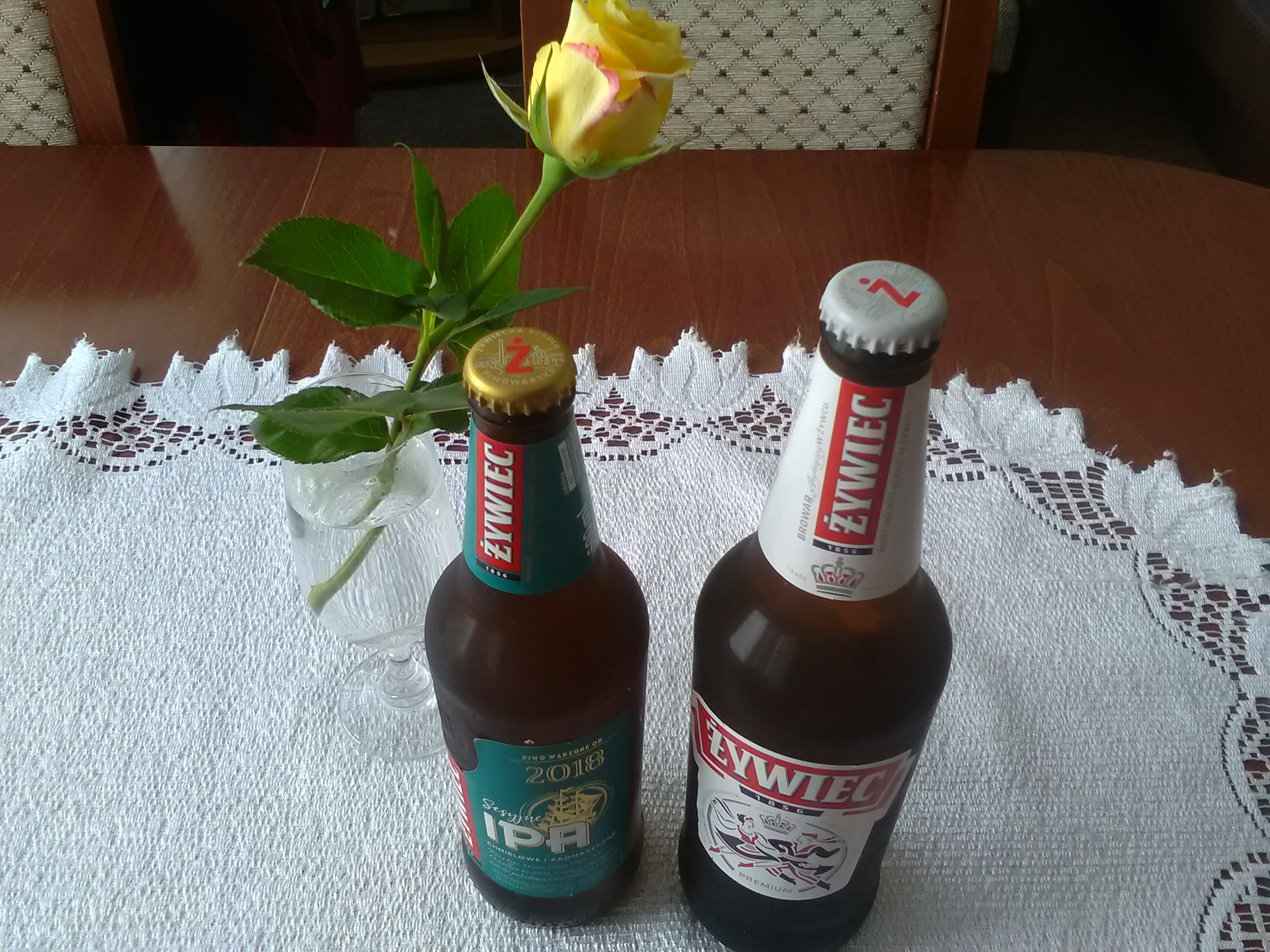 Butelki piwa Żywiec.